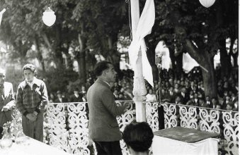 Luís Manteiga nun mitin pro-estatuto o 27 de xuño de 1936 en Lugo.